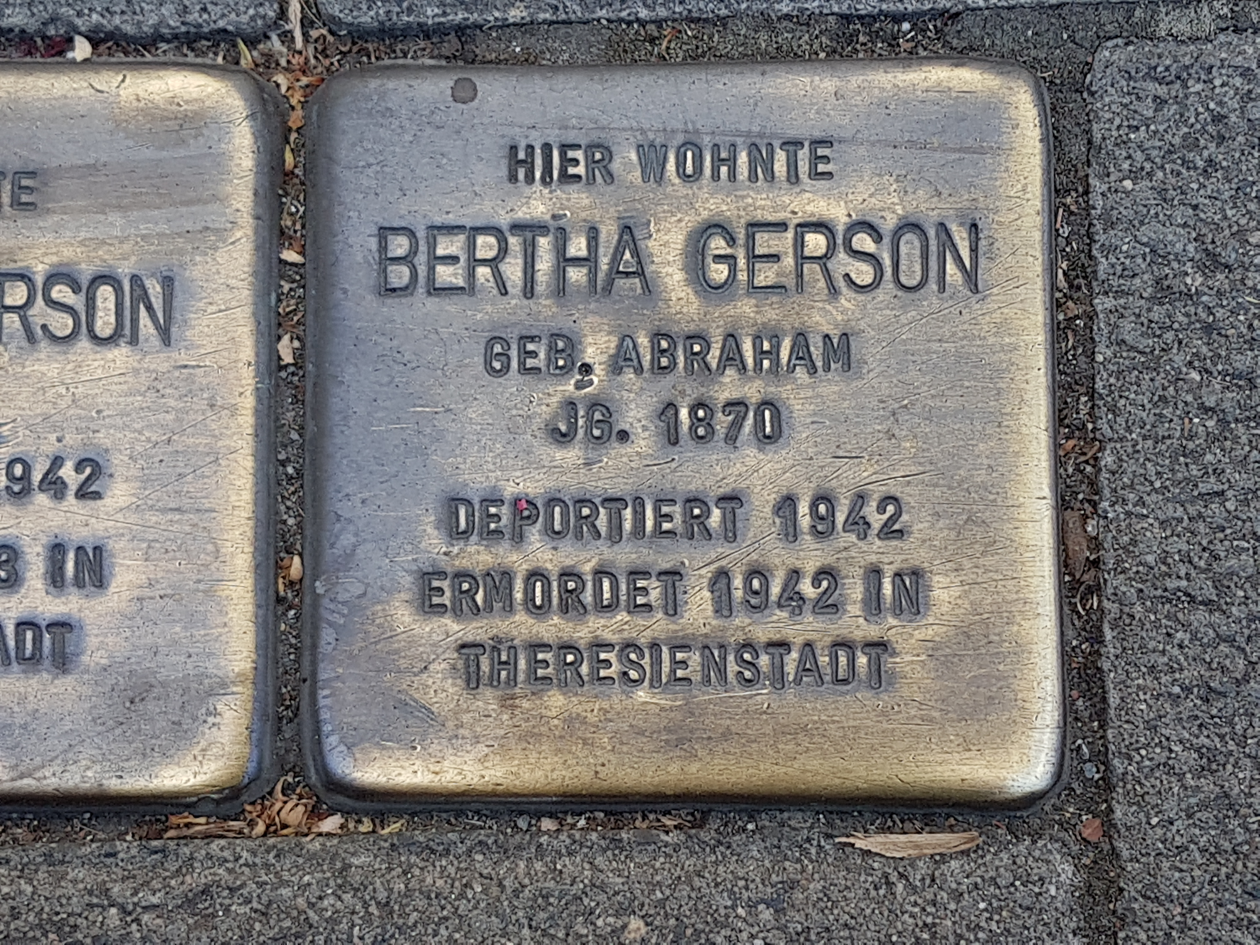 Stolperstein Duisburg